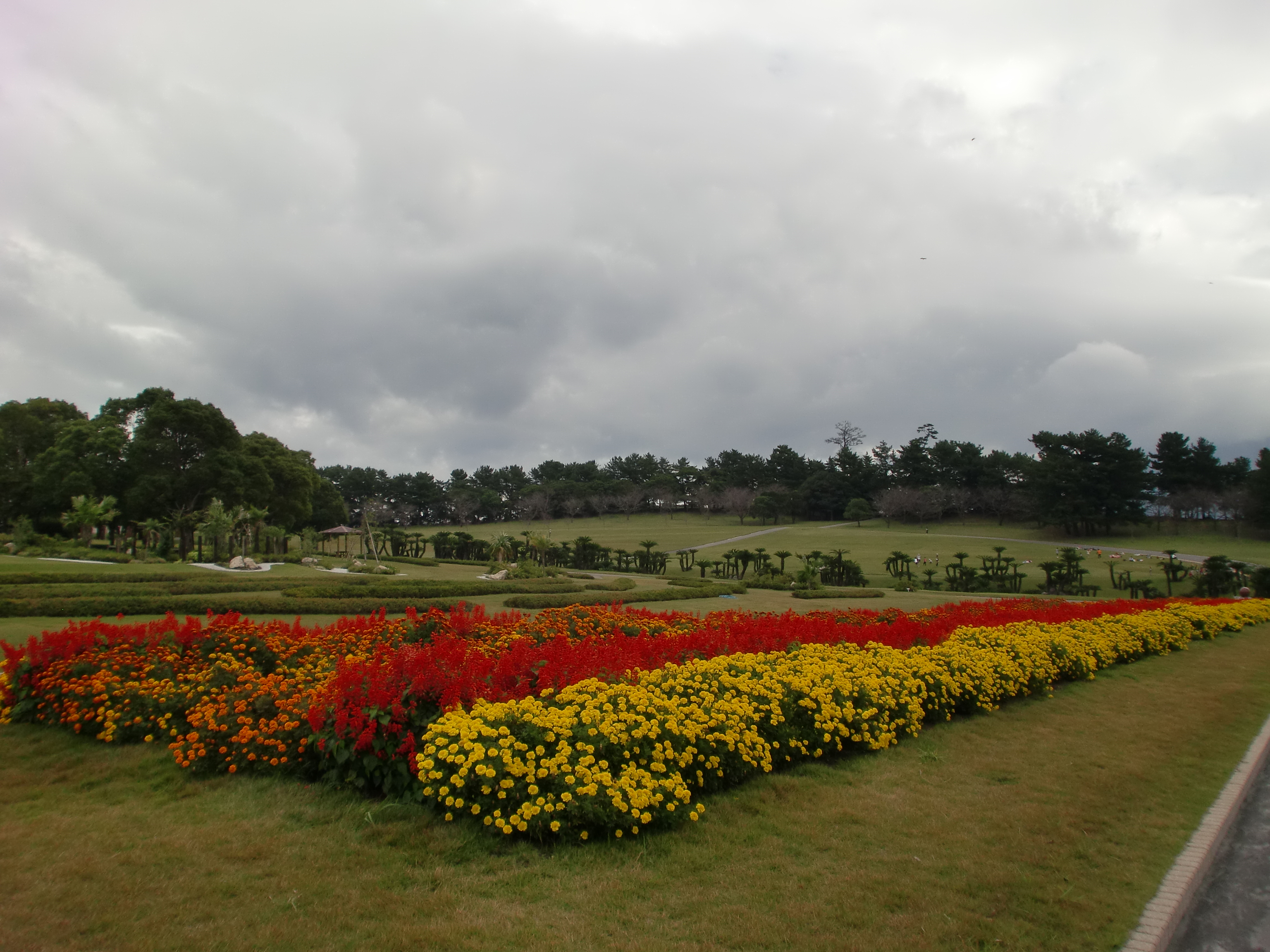 鹿児島県立吉野公園の花壇。